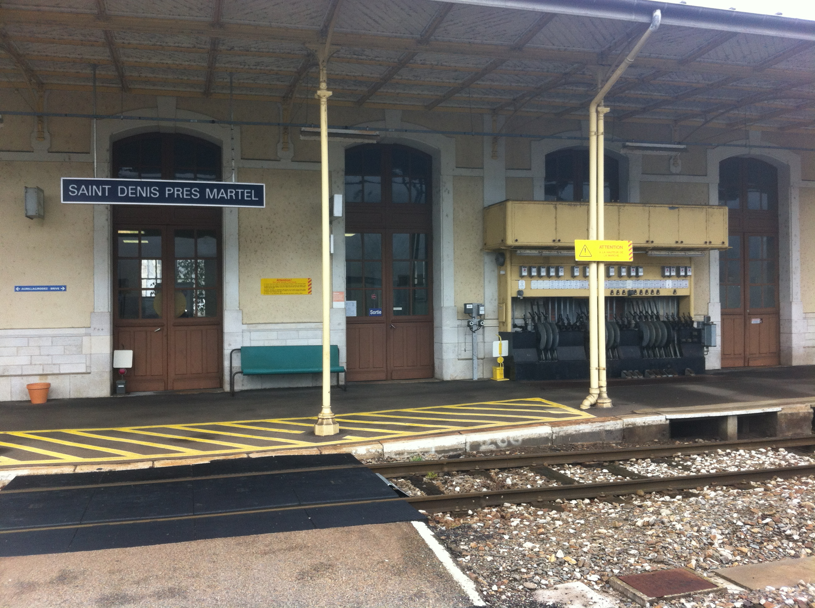 Poste d'aiguillage de la gare